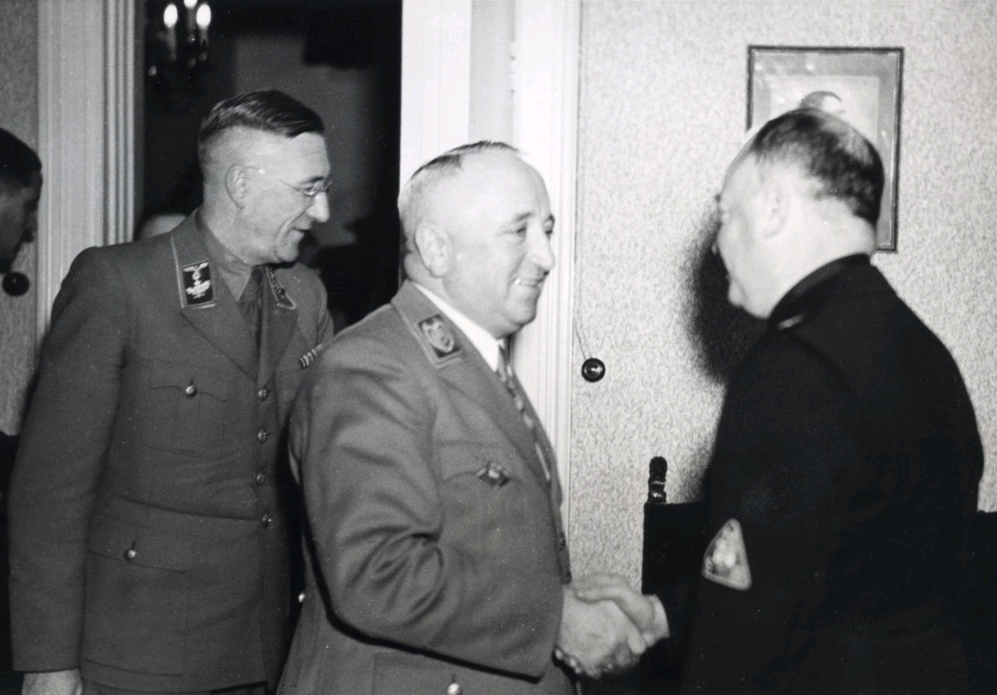 Ir. A. A. Mussert (1894-1946) (rechts) ontvangt op 7 (17?) februari 1944 op zijn hoofdkwartier in Utrecht de Duitse Nazi politicus Dr. Robert Ley (1890-1945). Links (met bril) Generalkommissar zur besonderen Verwendung Wilhelm Ritterbusch.